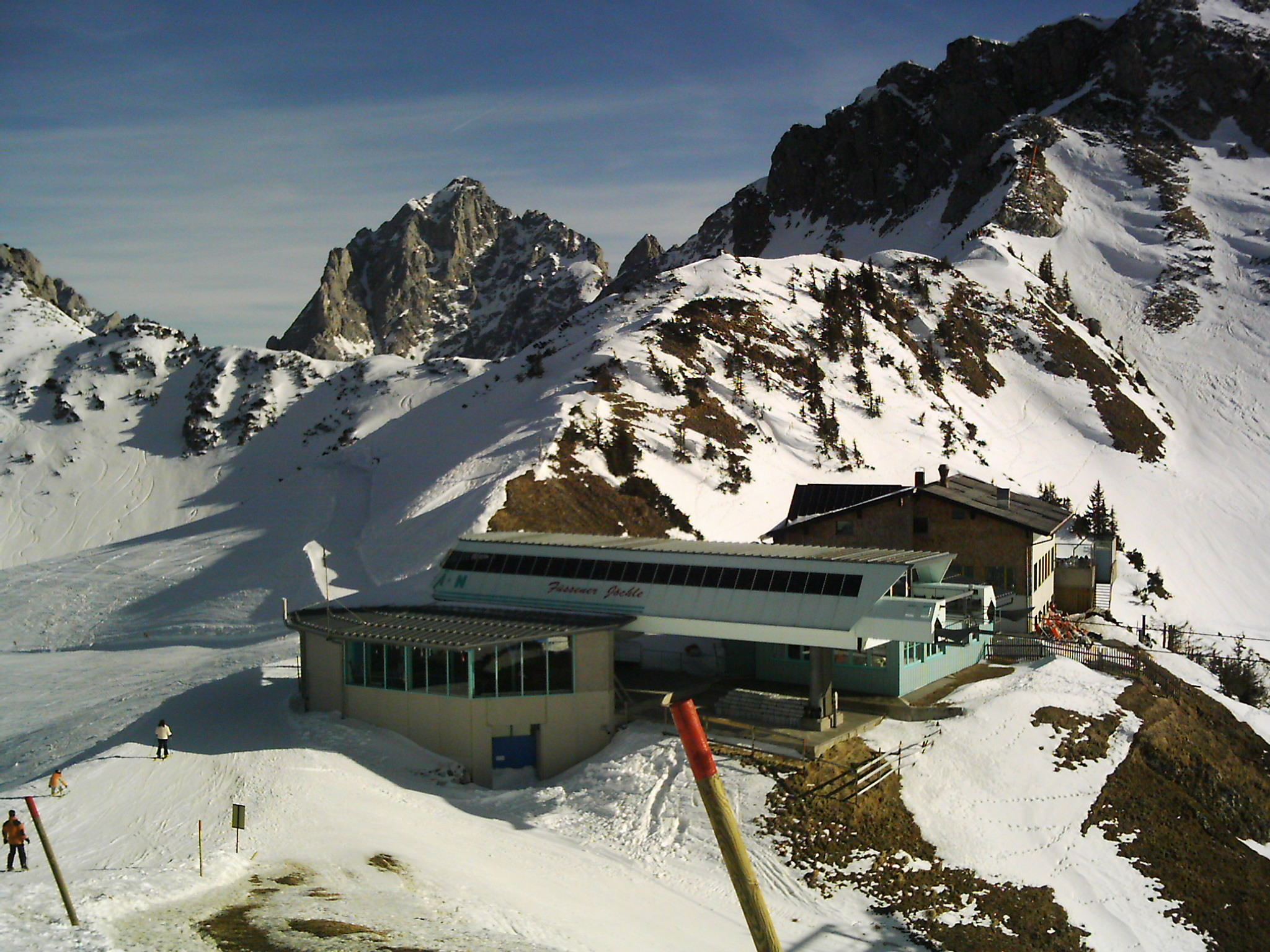 Bergbahn Füssener Jöchle in Grän, Tannheimer Tal, Tirol